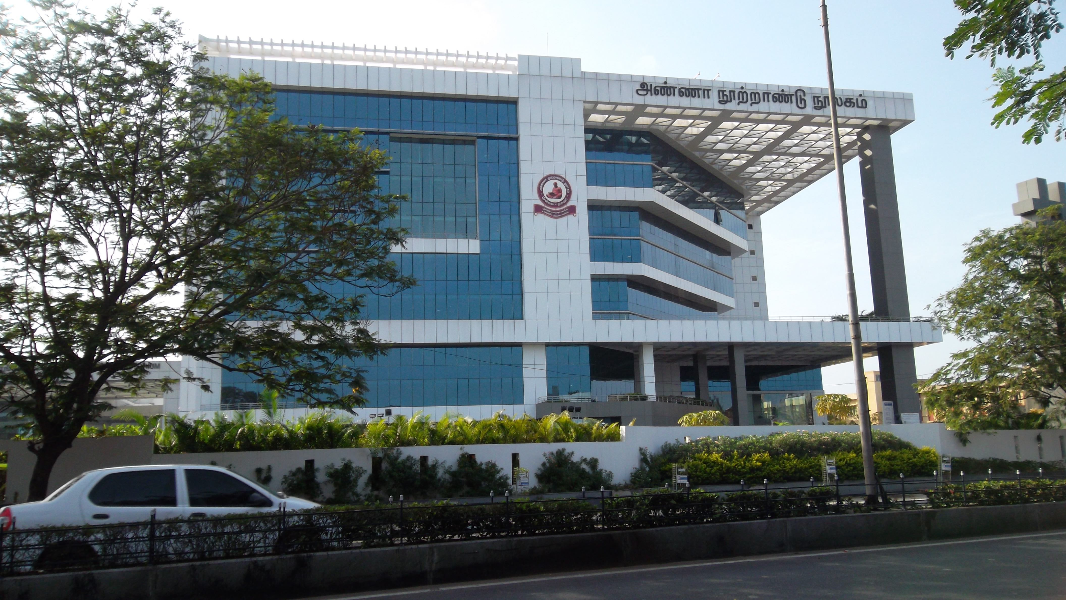 அண்ணா நூற்றாண்டு நினைவு நூலகம் கோட்டுர்புரம்,சென்னை